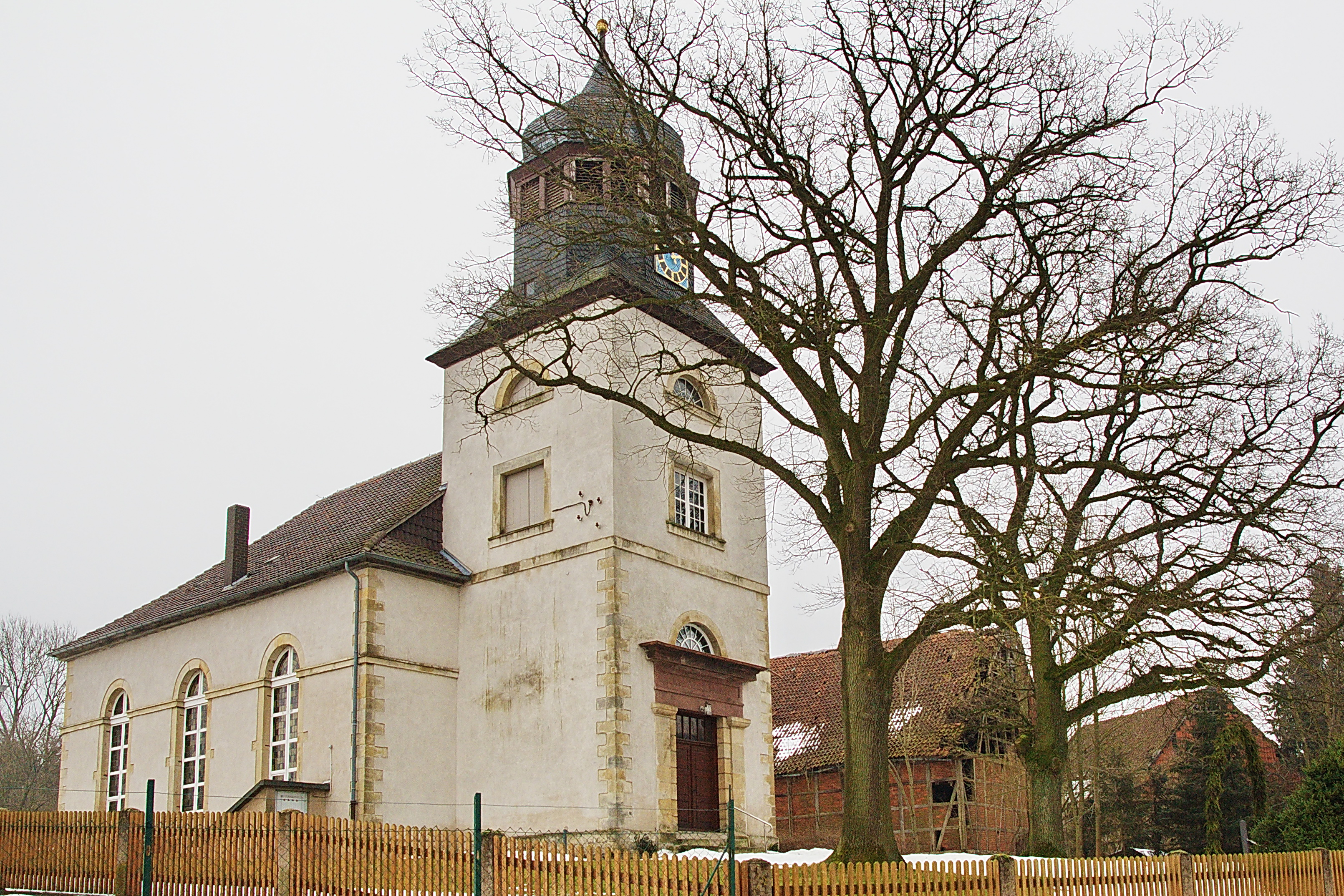 St.Georg-Kirche in Naensen (Einbeck), Niedersachsen, Deutschland